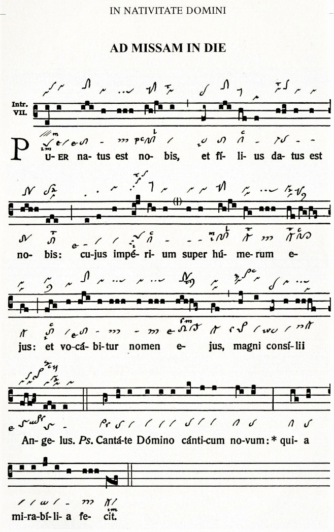 Introitus "Puer natus est nobis", Ad Missam in die, Sollemnitas in nativitate Domini (1. Weihnachtstag); gregorianischer Choral mit Neumen Quelle: Graduale Novum – Editio magis critica iuxta SC 117. Tomus I: De dominicis et festis. ConBrio Verlagsgesellschaft, Regensburg 2011, ISBN 978-3-940768-15-5, S. 28.